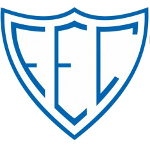 Escudo antigo do FEC